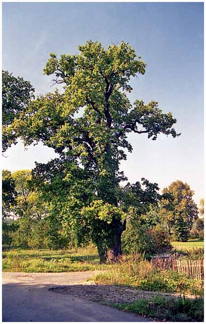 Katastrální dub v Hrádku u Pardubic, historické trojmezi obcí Lázně Bohdaneč, Hrádek a Doubravice.